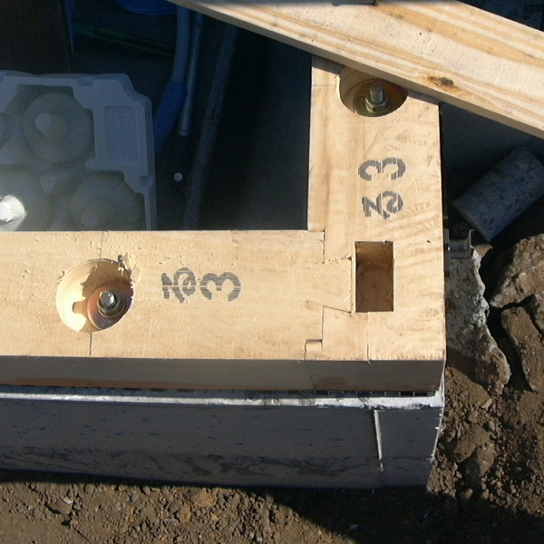 欠陥住宅_木造_金物_01